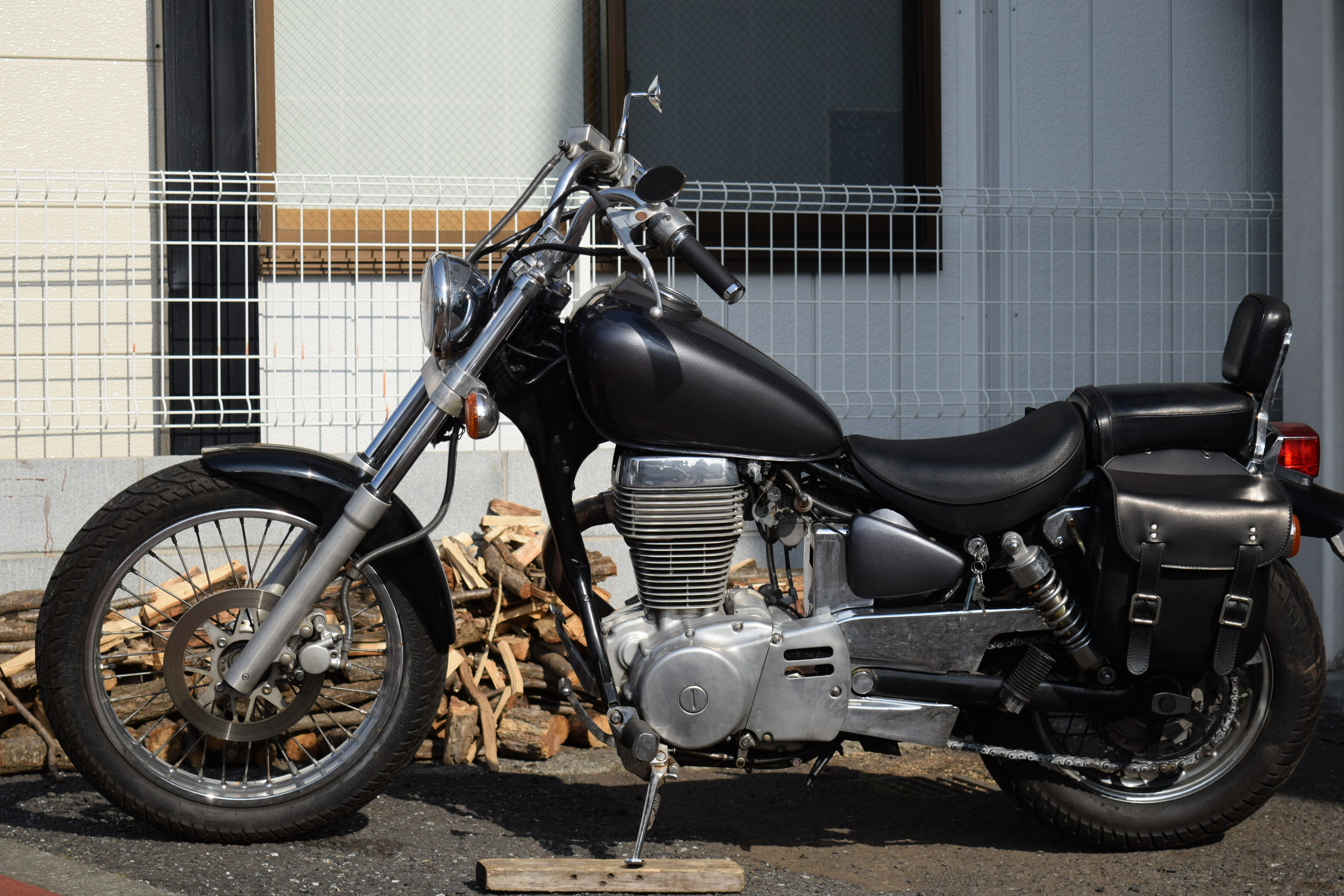 サベージの写真です